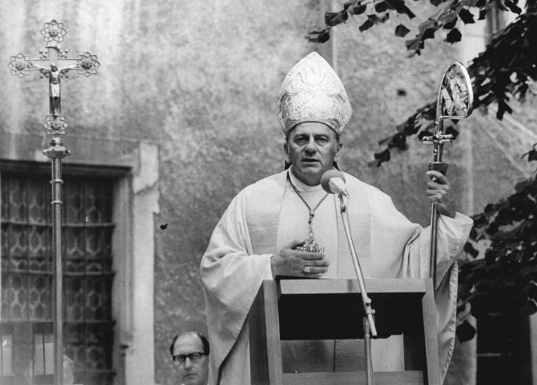 ADN-ZB-Ludwig-24.9.78-B- Erfurt: 300 Jahre Wallfahrtskirche Worbis - In Worbis feierten am 24.9.78 die katholischen Bürger des Eichsfeldes das 300jährige Bestehen der St. Antonius-Kirche. Höhepunkt war ein Festgottesdienst mit Kardinal Alfred Bengsch, hier bei der Predikt vor der Barockkirche.